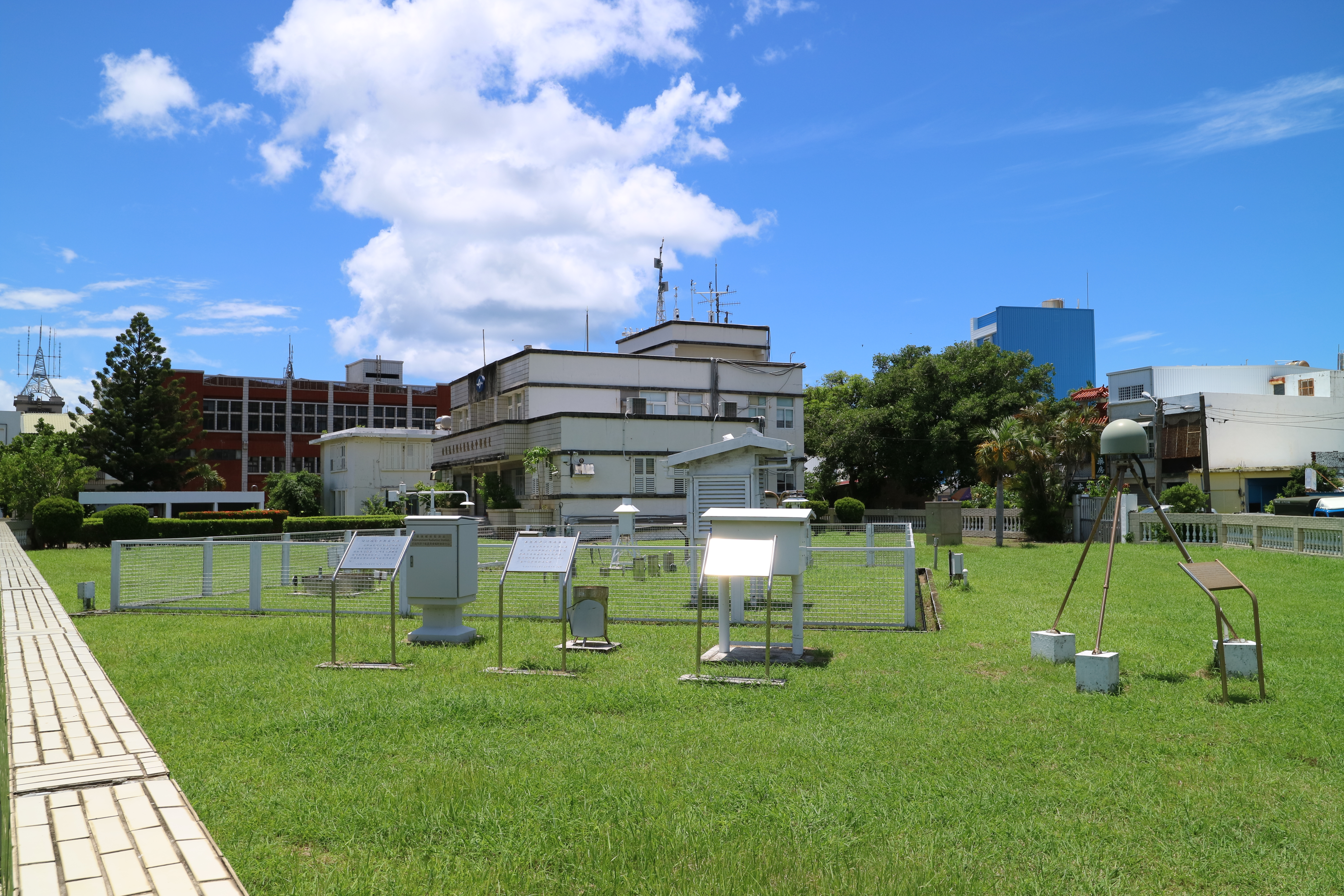 中文（台灣）: 交通部中央氣象局恆春氣象站觀測坪